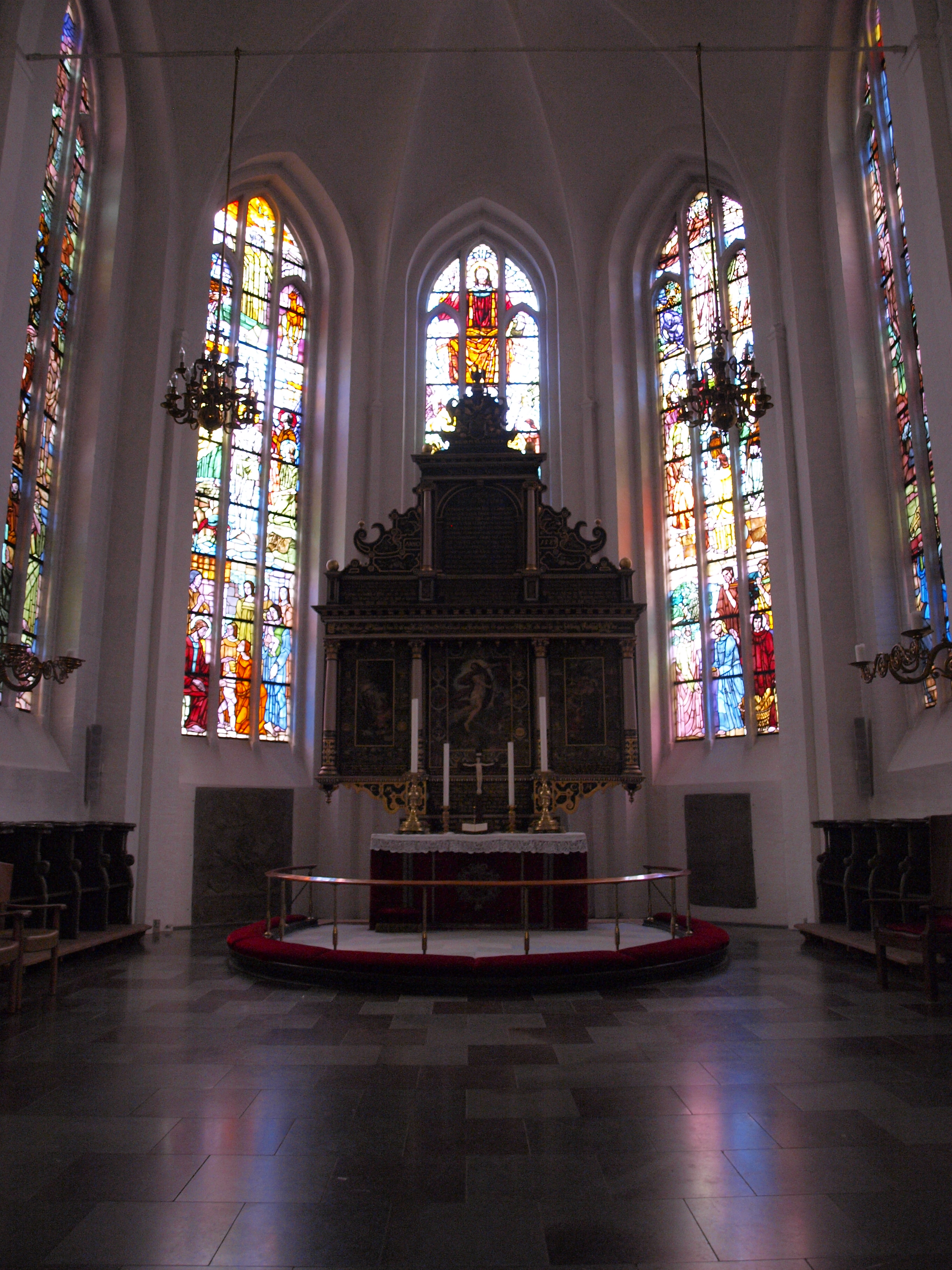 Sankt Nikolai Kirke (Kolding Kommune) alter, september 2015